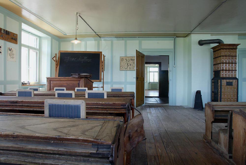 Schulzimmer 1920-30